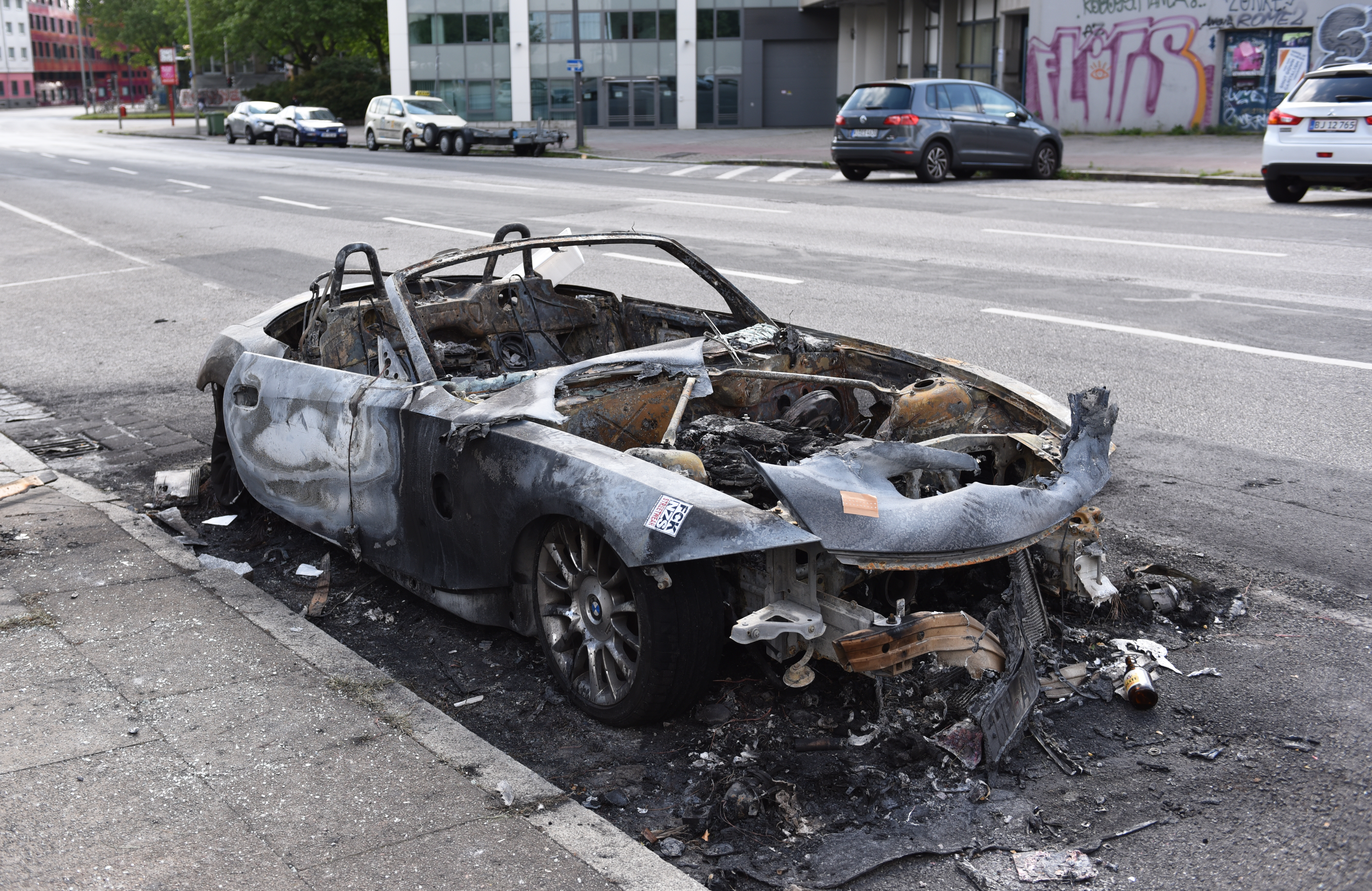 Impressionen nach der ersten Nacht der Ausschreitungen bei dem G-20 Gipfel im Hamburg: ausgebrannter BMW Z4 (E85).